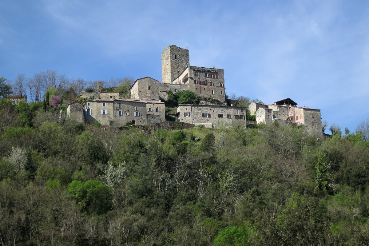 Montréal (Ardèche), depuis la route départementale D5